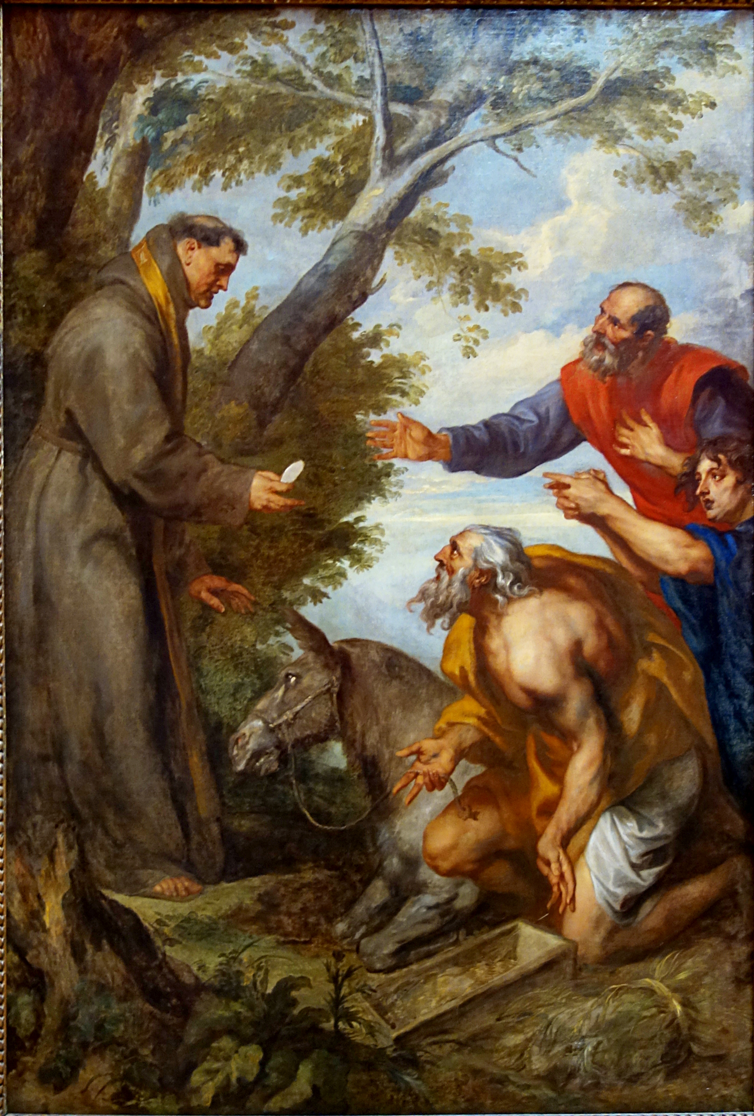 Le miracle de la mule ou Miracle de saint Antoine de Padoue à Toulouse, au Palais des beaux-arts de Lille.